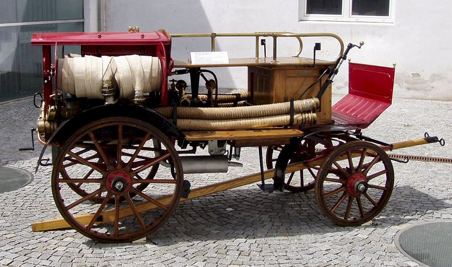 Landfahr-Motorspritze, Fabrikat: Rosenbauer, Type: Linz II a, Baujahr 1923